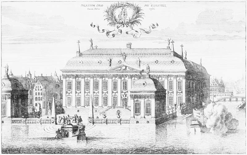 Riddarhuset i Stockholm, etsning på papper av Johannes van den Aveelen. Nationalmuseums inventarienummer NMG 472/1875.